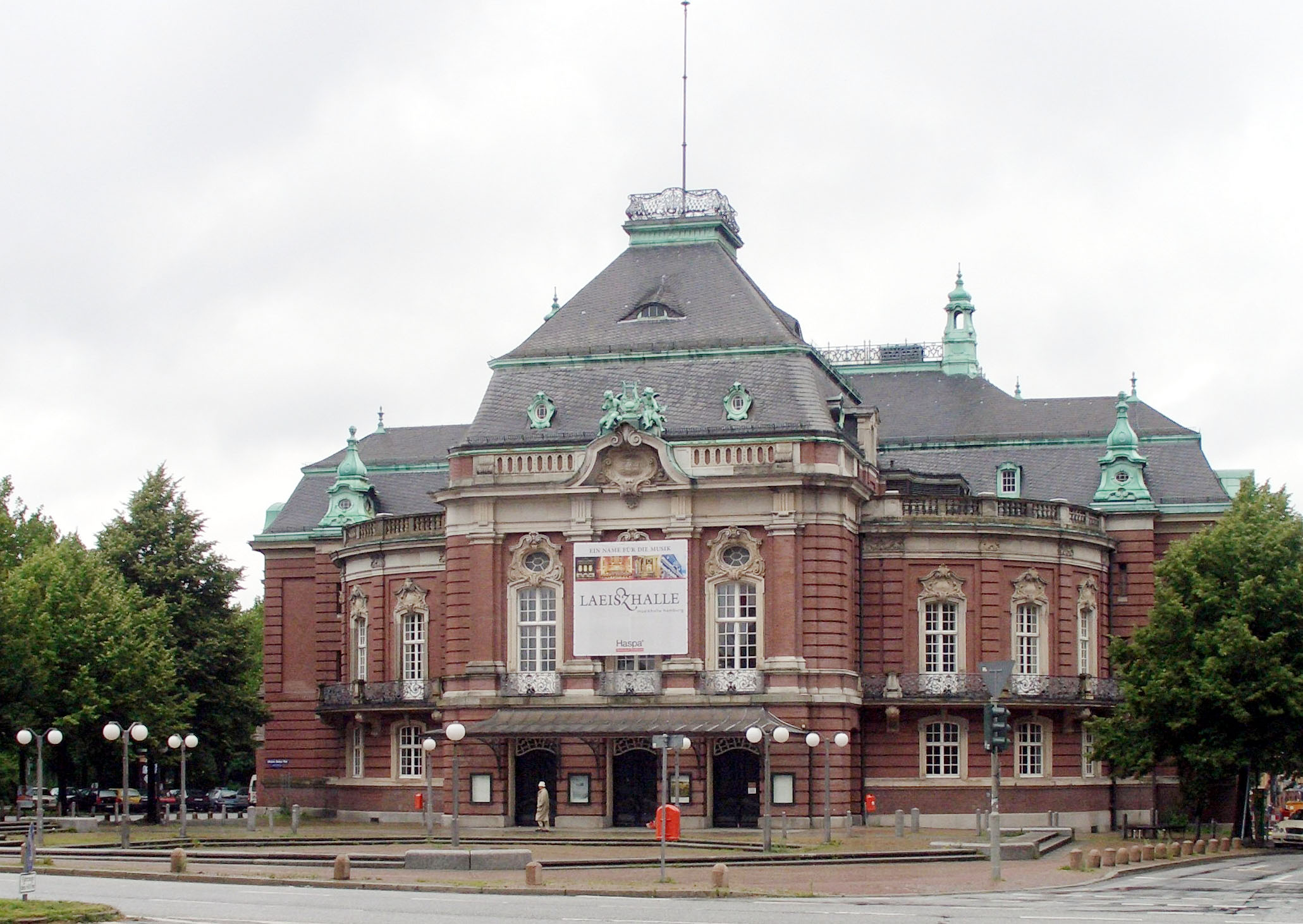 Laeiszhalle Hamburg